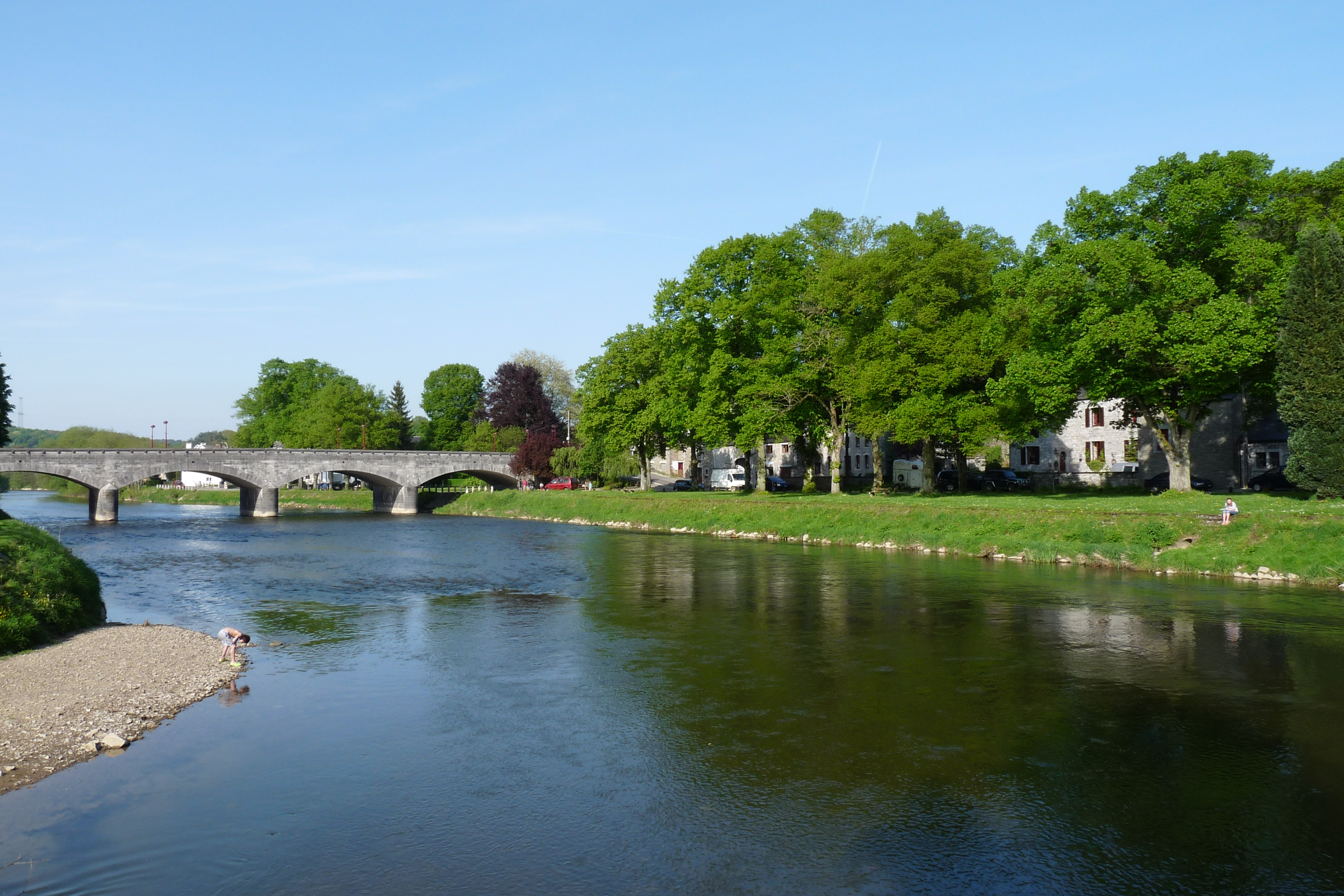 Pont de Hamoir depuis la rive du Néblon (amont)